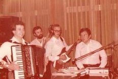 grupa Mali Palić